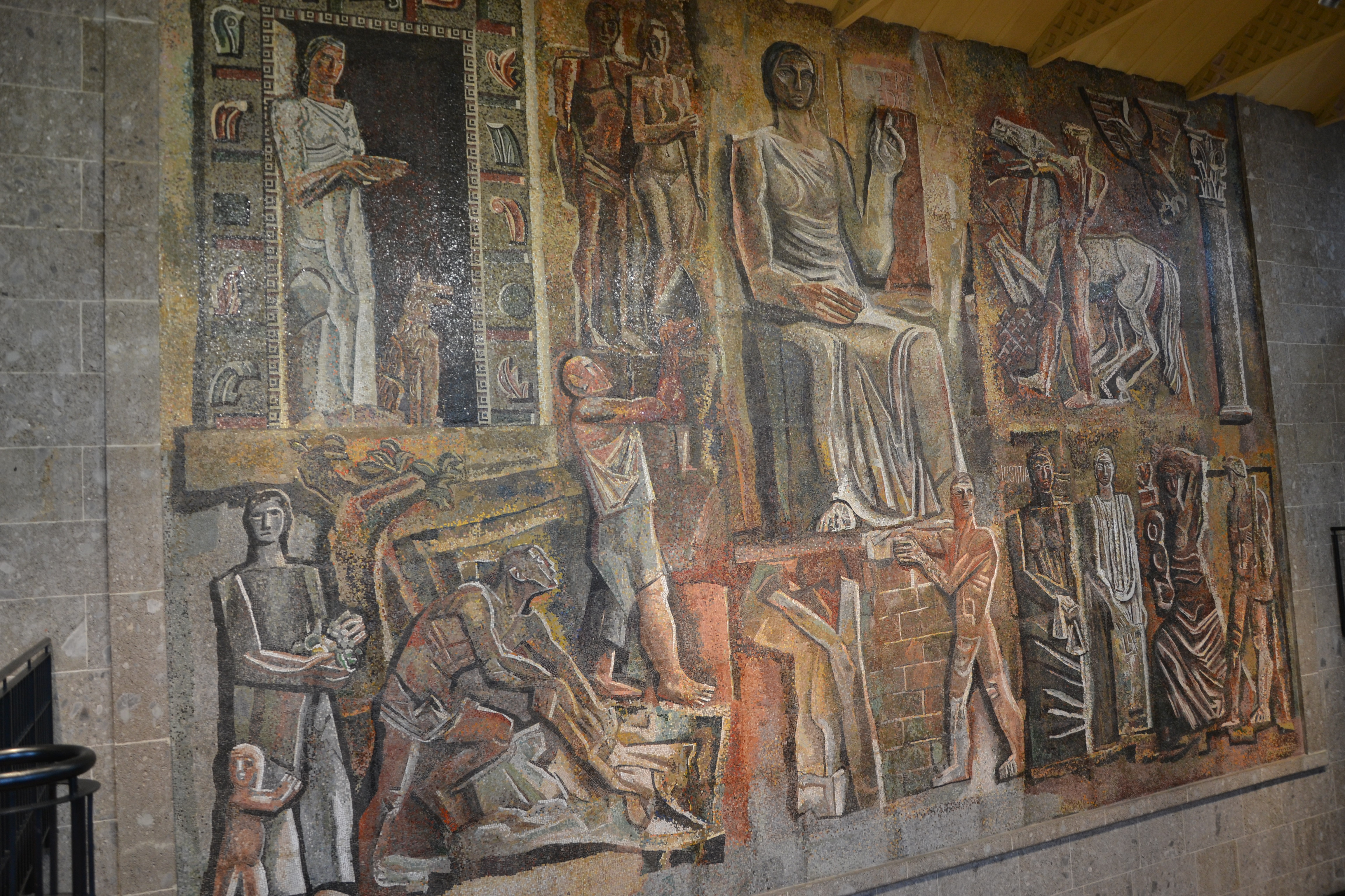 Mario Sironi, mosaico dal titolo Il lavoro fascista (1936-1937), Palazzo dell'informazione, o in origine Palazzo del Popolo d'Italia, piazza Cavour, Milano